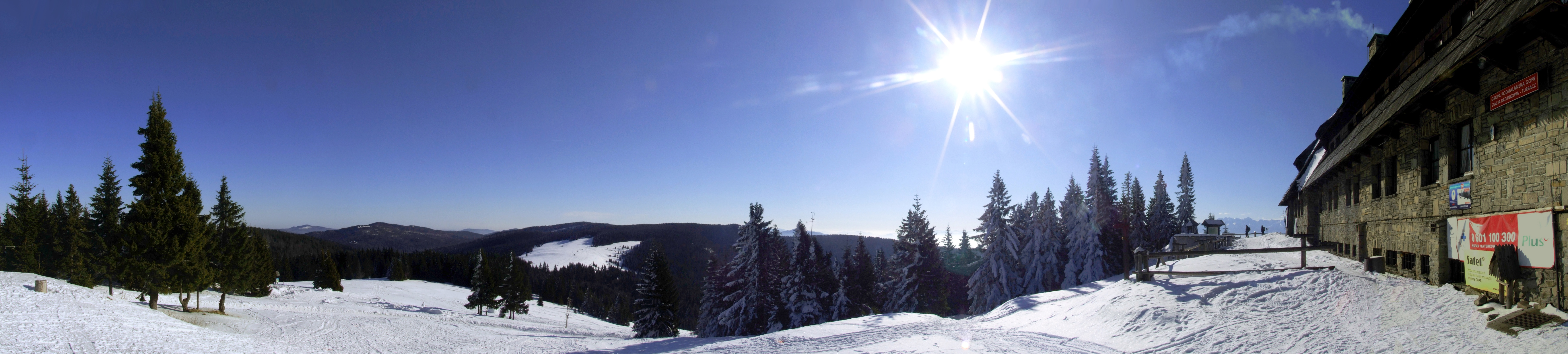 Panorama spod schroniska na Turbaczu na wschodnią stronę